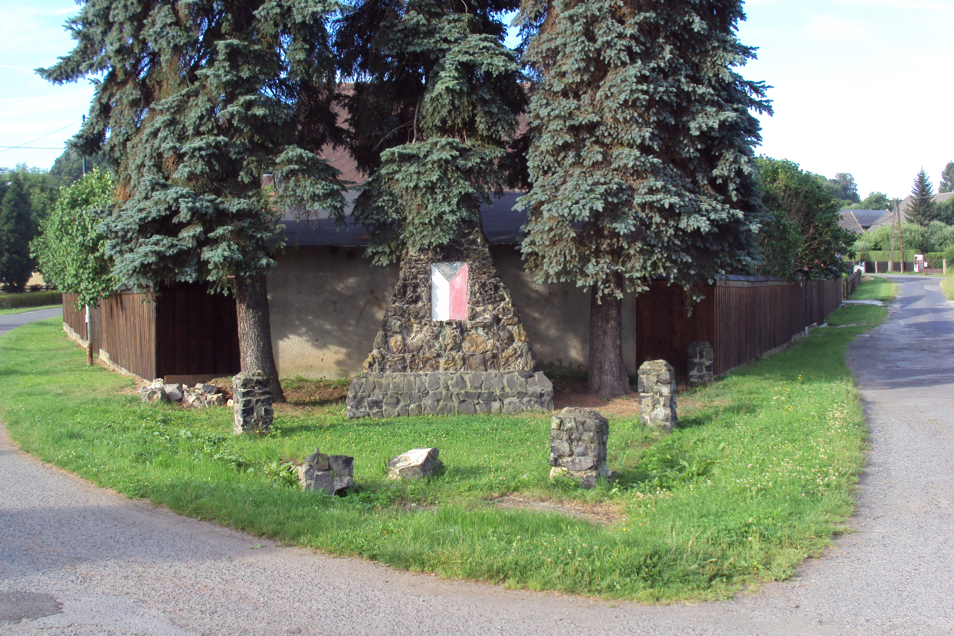 Vesnička Zbyny asi 3km od Doksy, nepopsaný pomník